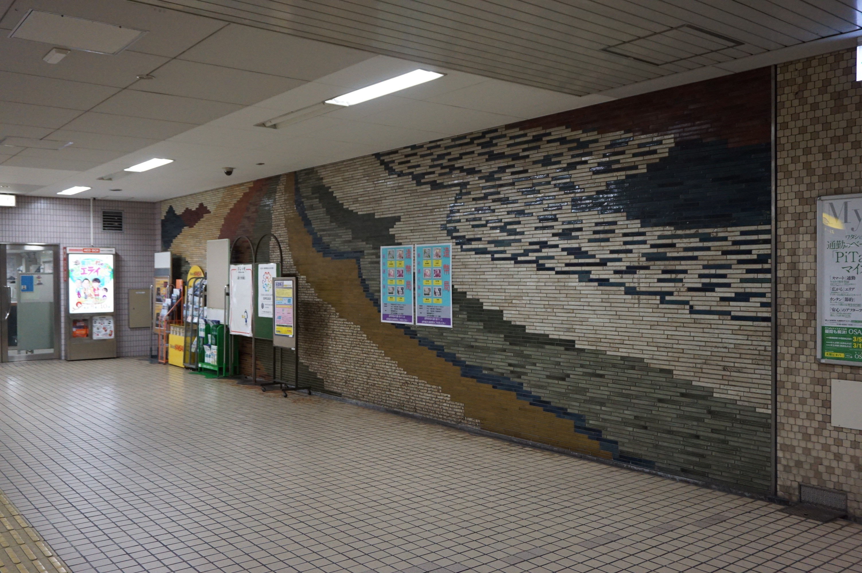 改札前のタイル壁画